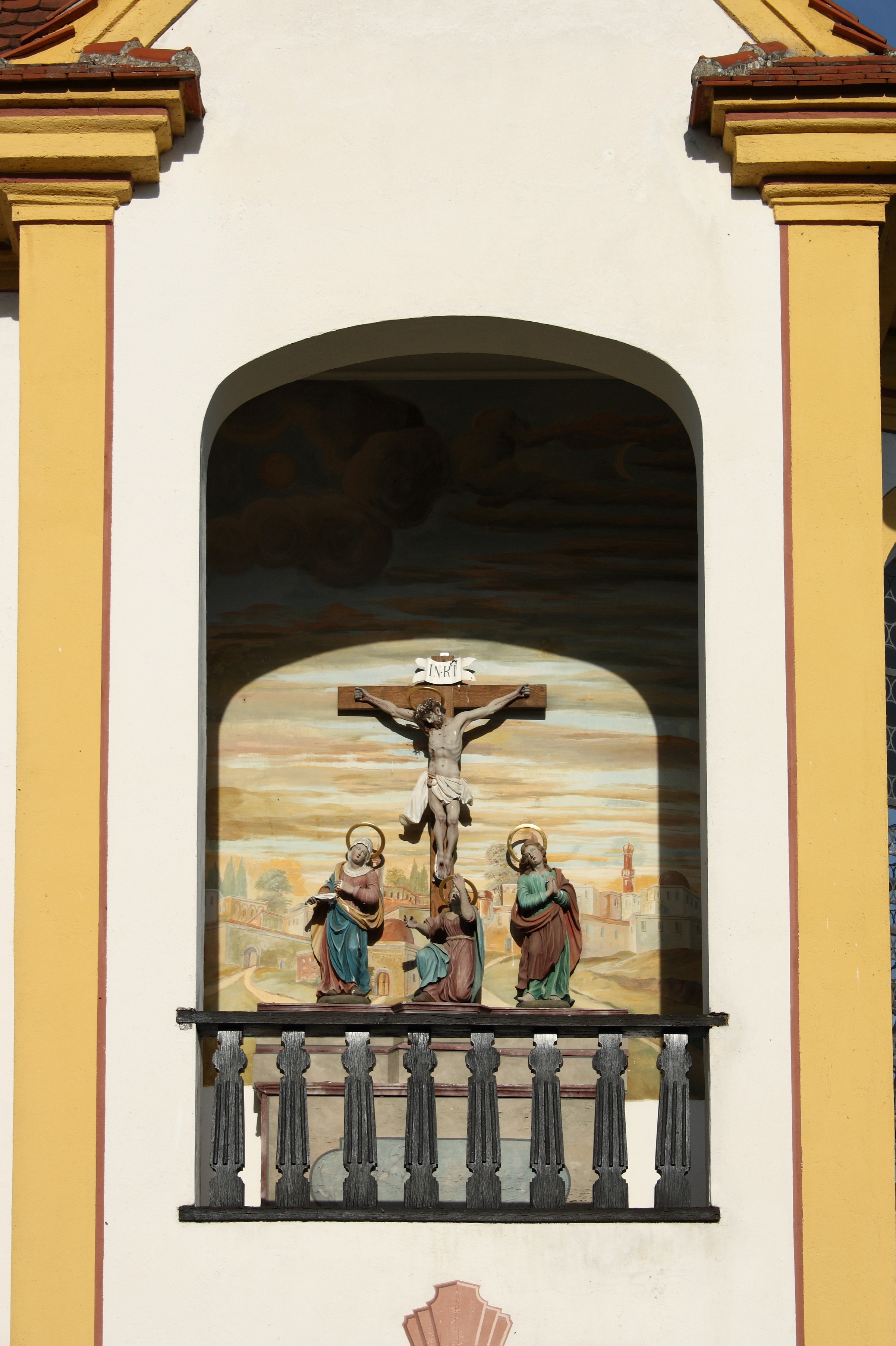 Katholische Kapelle St. Maria Magdalena in Eichenhofen, einem Ortsteil von Haldenwang im Landkreis Günzburg (Bayern), Kreuzigungsgruppe an der Südseite des Chores, um 1720